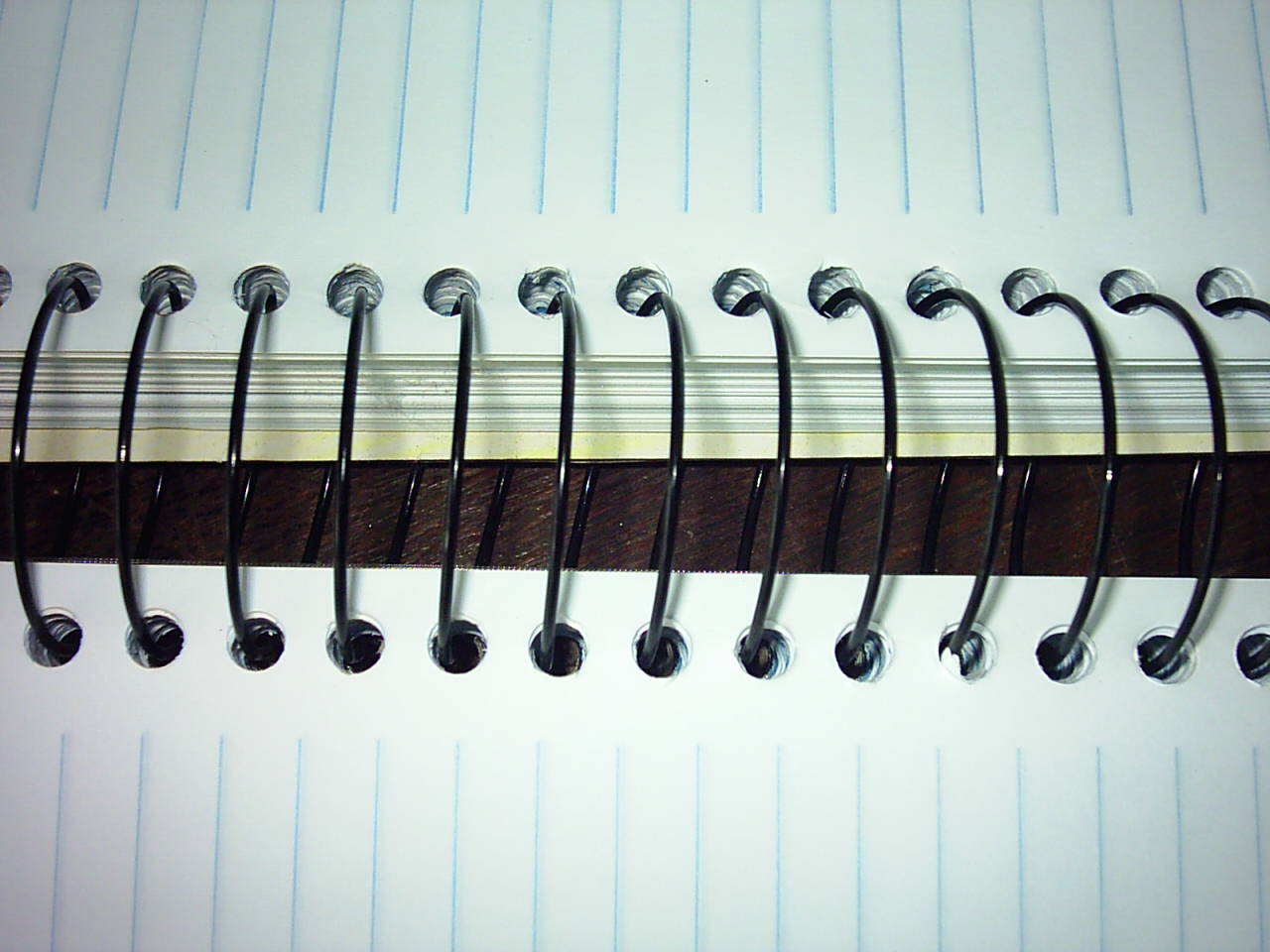 Foto de um exemplar encadernado em espiral